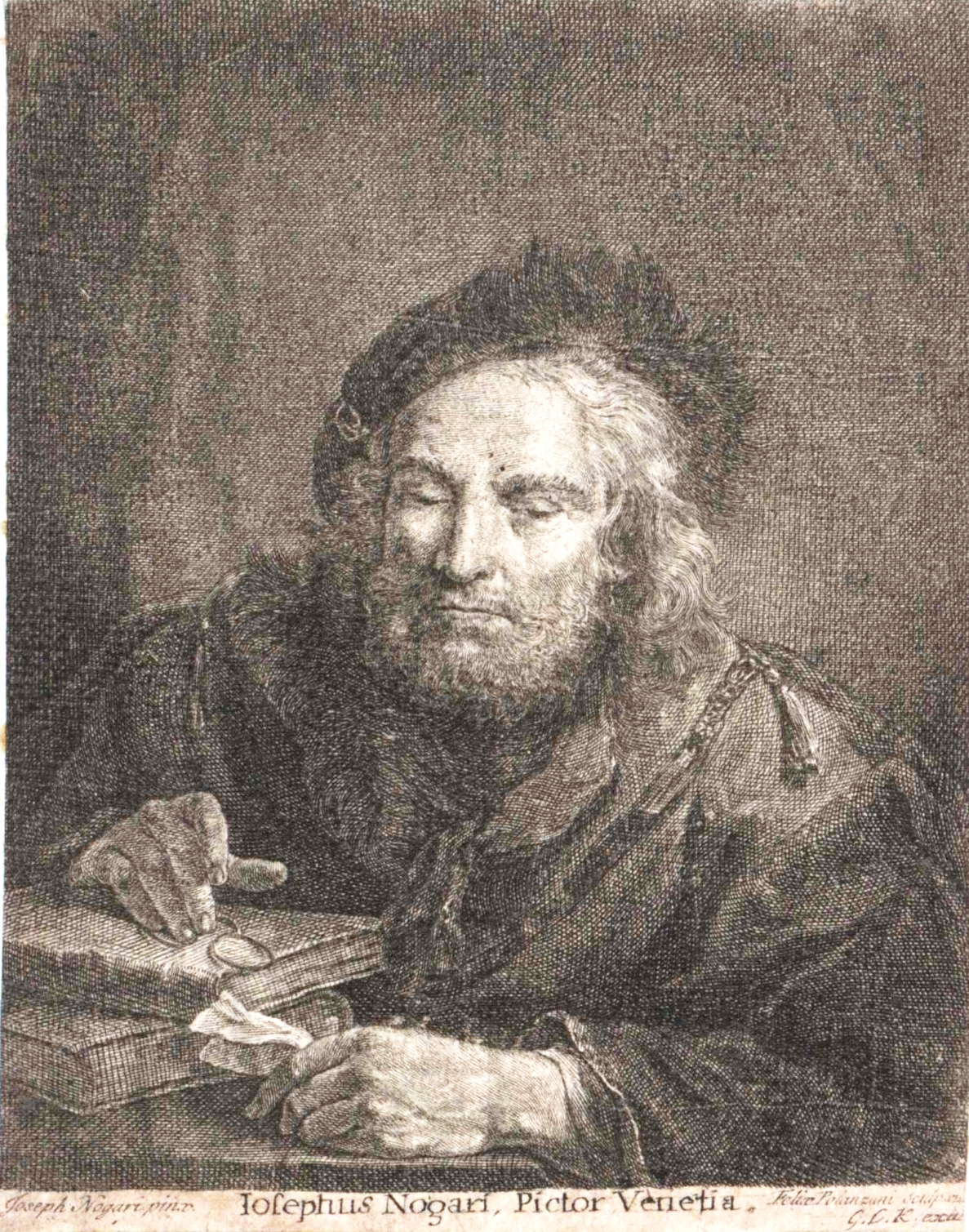 Joseph Nogari (1699–1766)